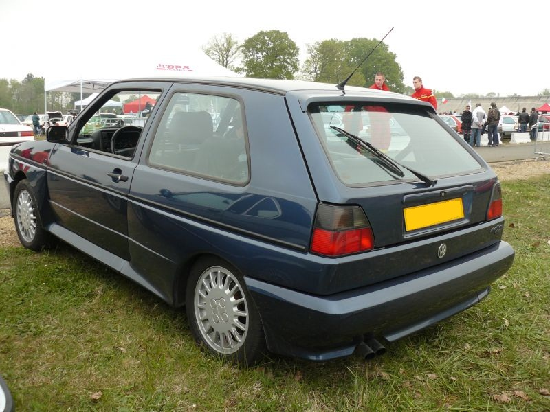 Français cadien: Montlhery avril 2012